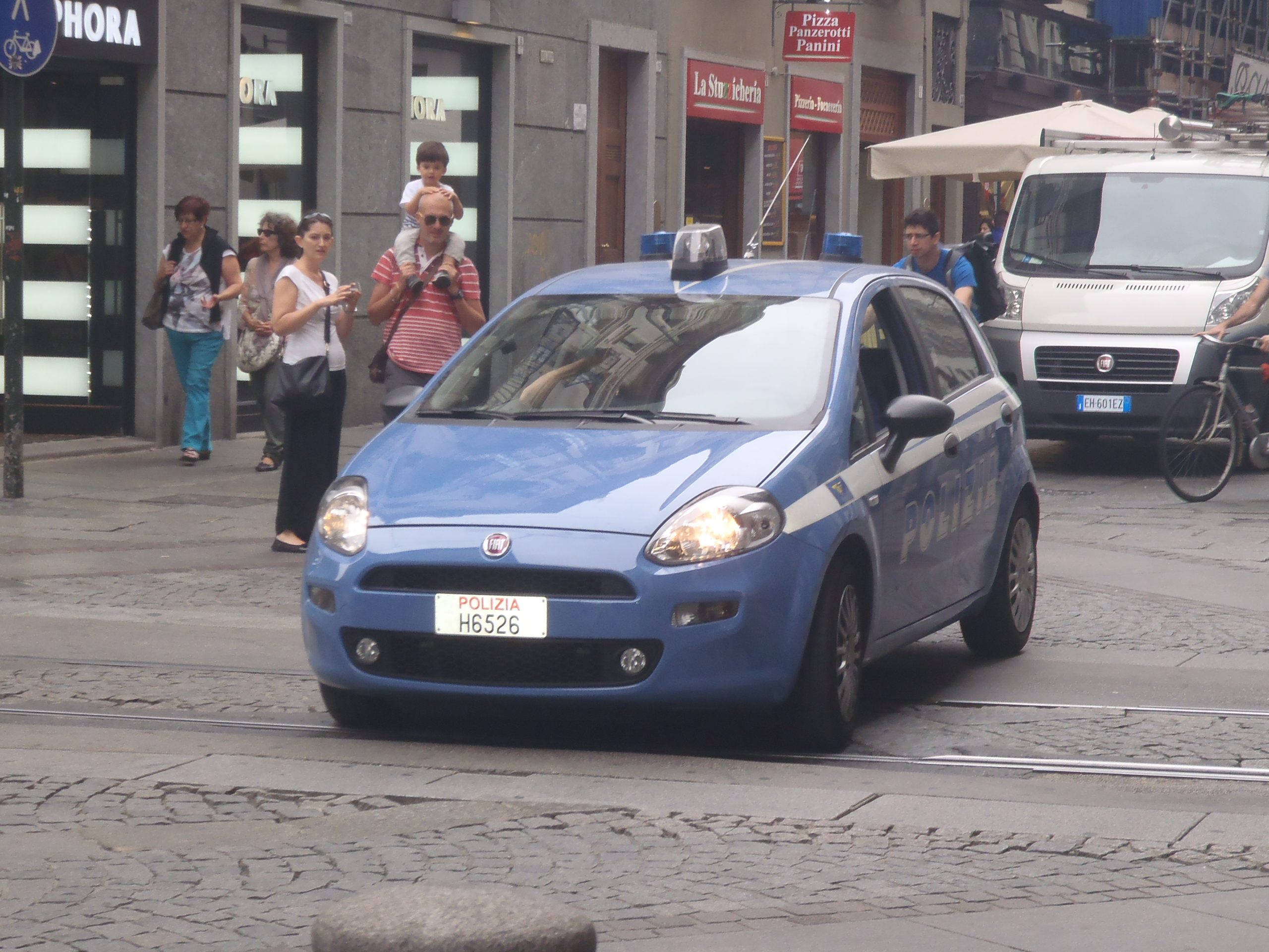 Fiat Punto Polizia at Turin